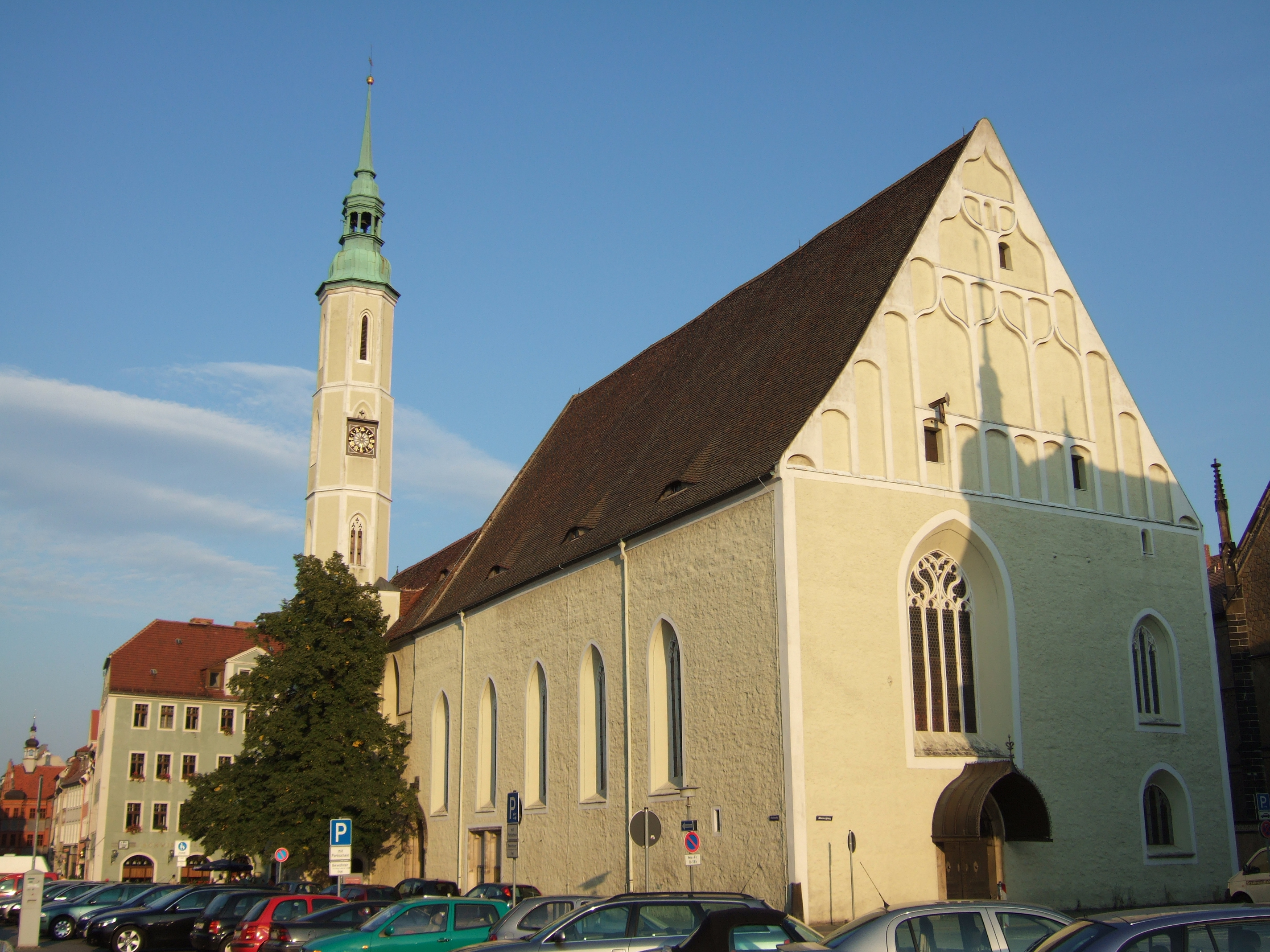 Die Dreifaltigskeitskirche in Görlitz